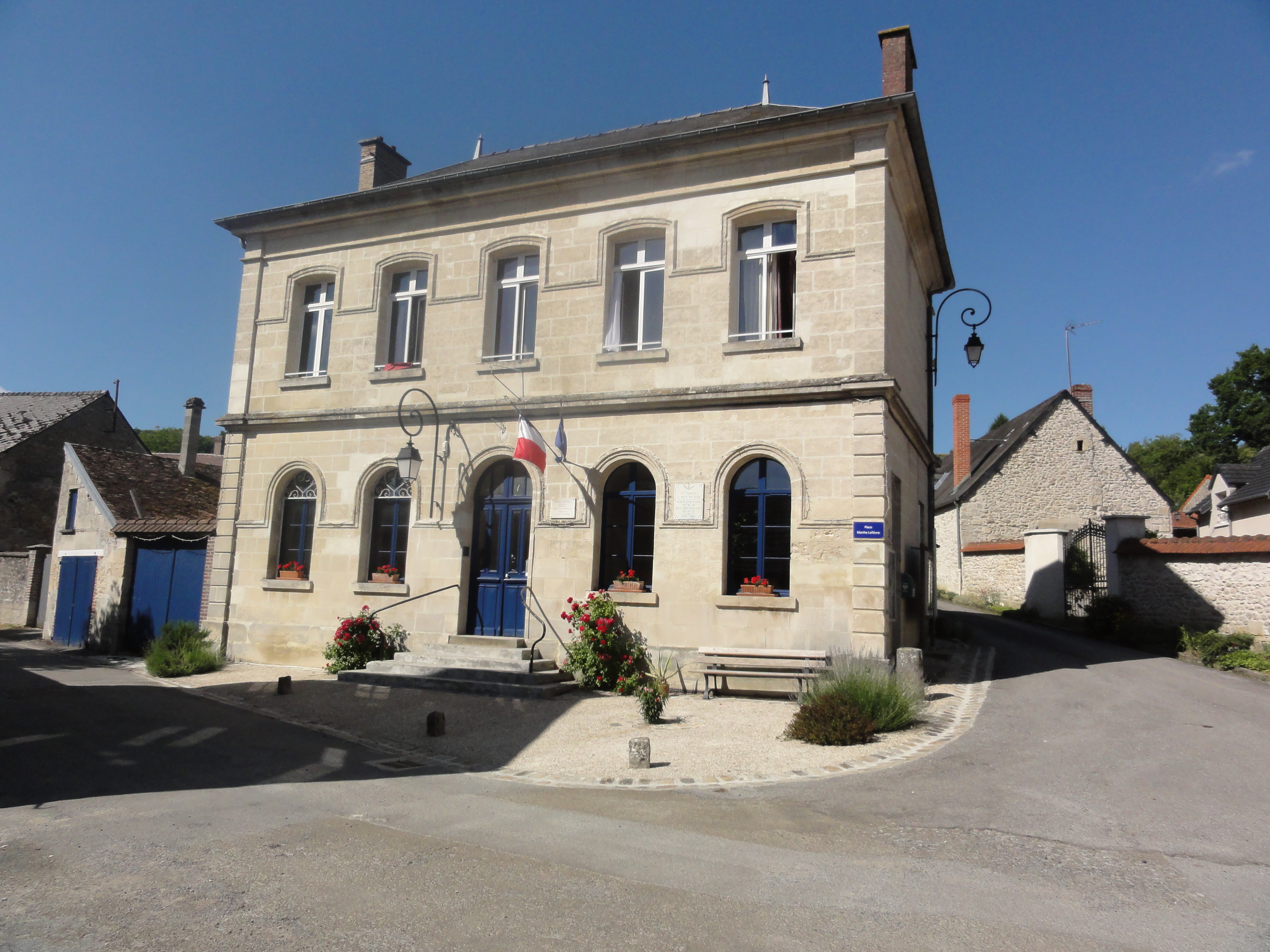 Saint-Thomas (Aisne) mairie